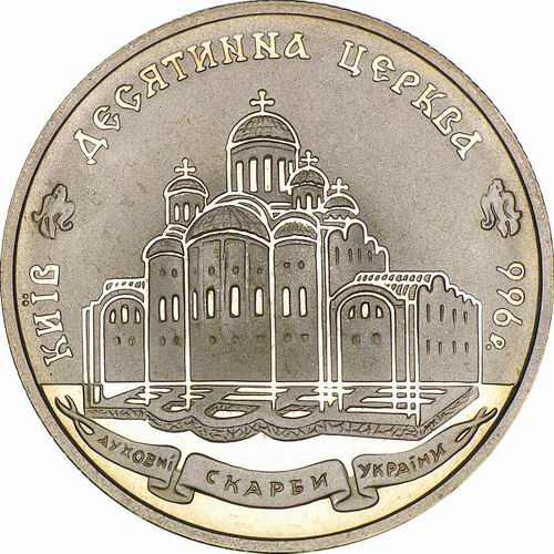 Серебрянная монета, посвящённая тысячелетию возведения Десятинной церкви в Киеве.